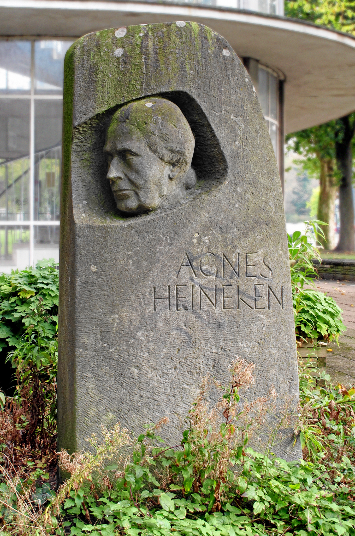 Denkmal Agnes Heineken in Bremen, Das abgebildete Objekt ist ein geschütztes Kulturdenkmal in der Freien Hansestadt Bremen, mit der Nr. 0322,T001 beim Landesamt für Denkmalpflege registriert.